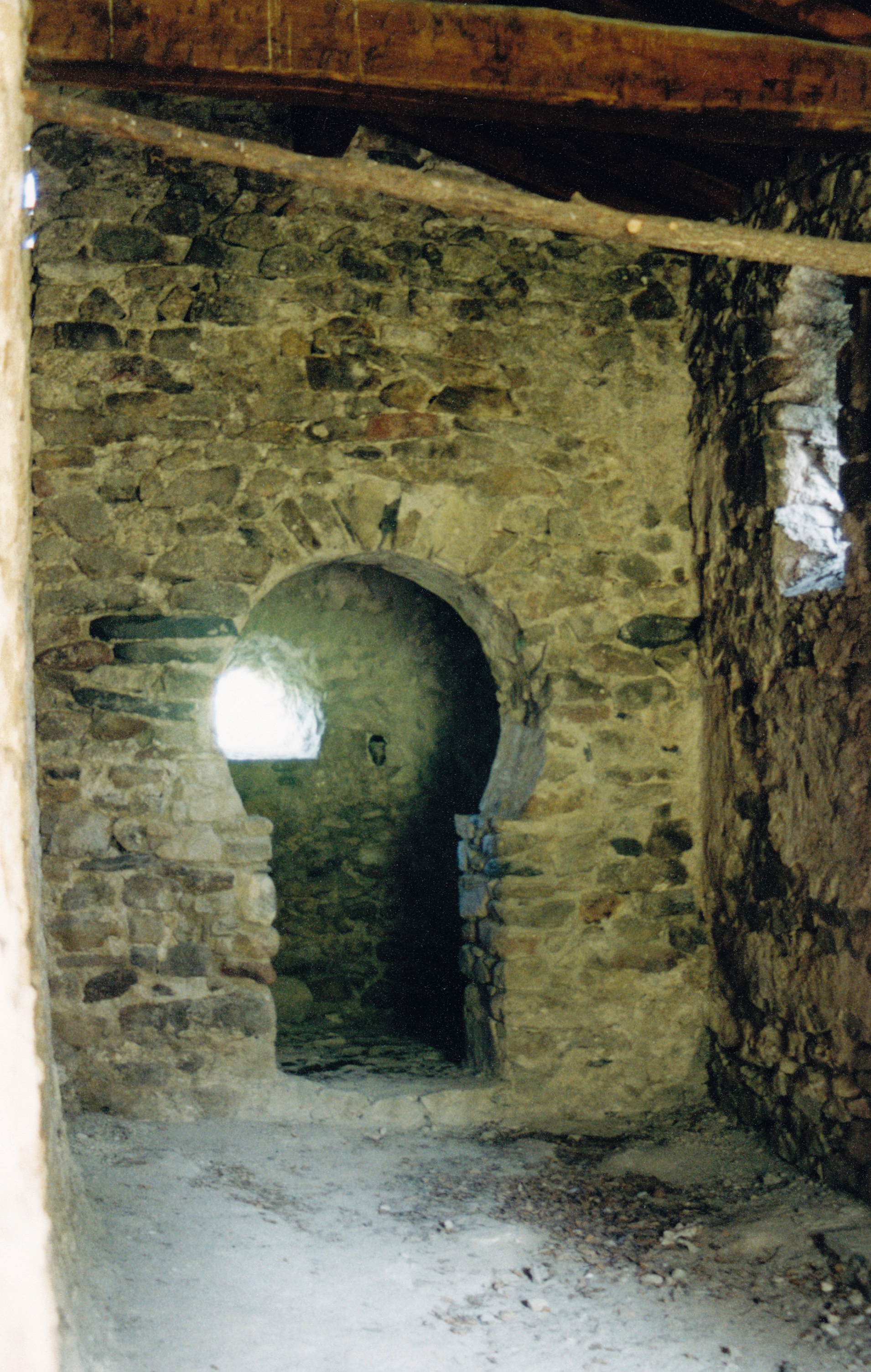 France - Fenouillèdes - Saint-Michel de Sournia (préroman) : arc triomphal outrepassé